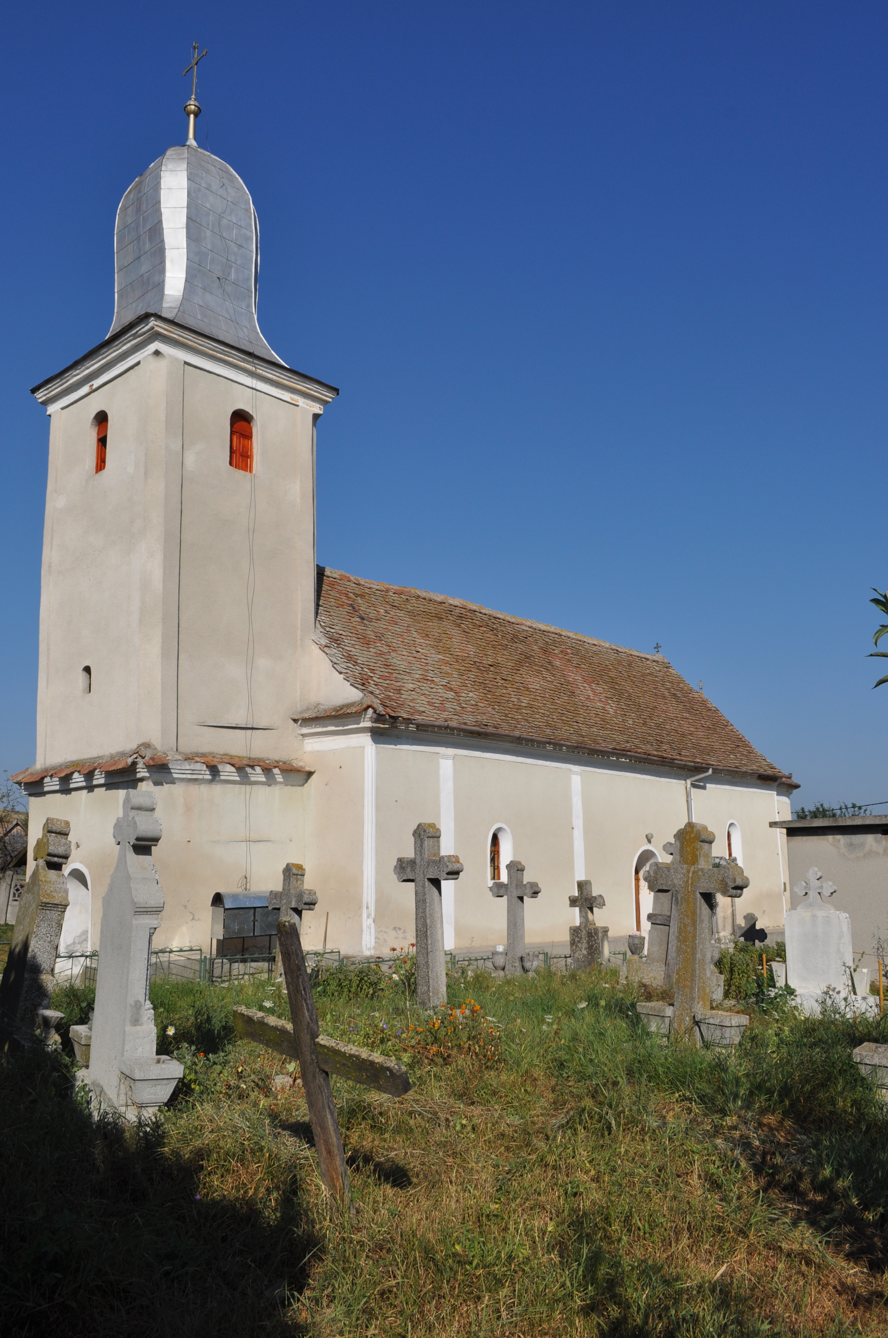 Biserica „Buna Vestire” din Cergău Mare, județul Alba